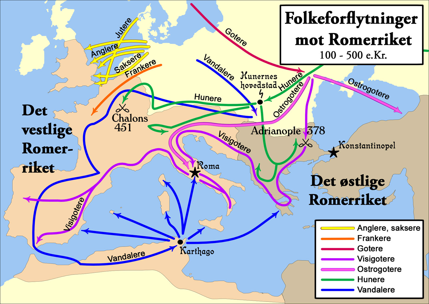 Folkevandringenes bevegelser (Migration Age, norwegian version)